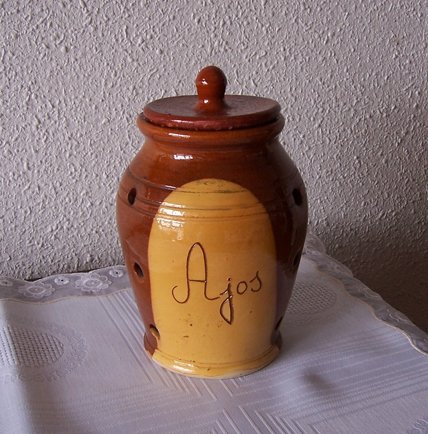 Cacharro en barro cocido diseñado para guardar ajos. Cerámica popular.